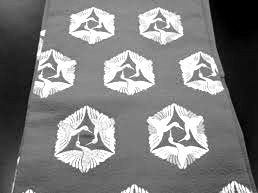 帯